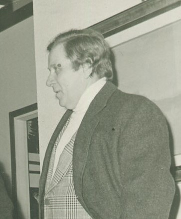 Federico Boriani